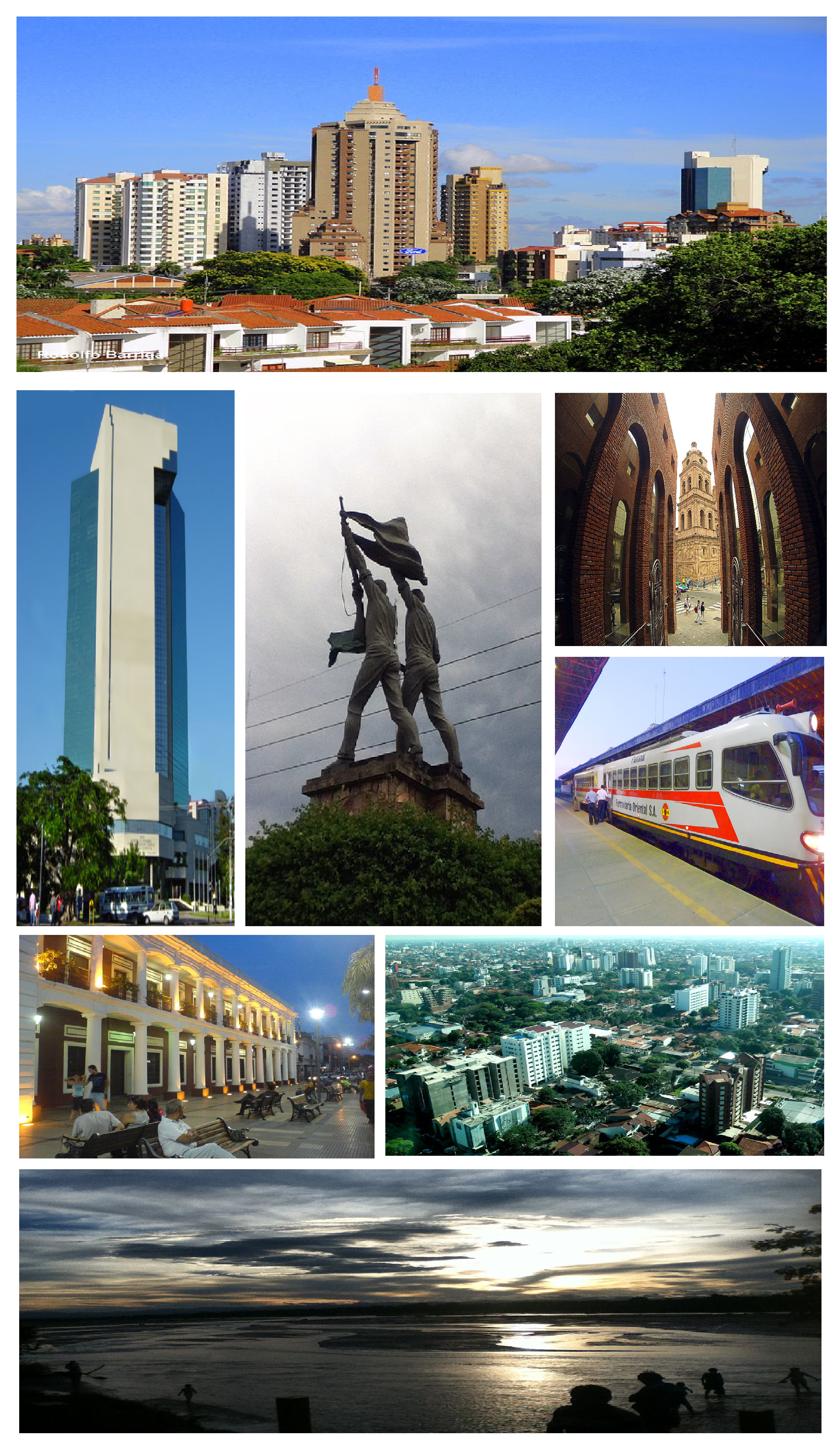 Collage de Santa Cruz de la Sierra